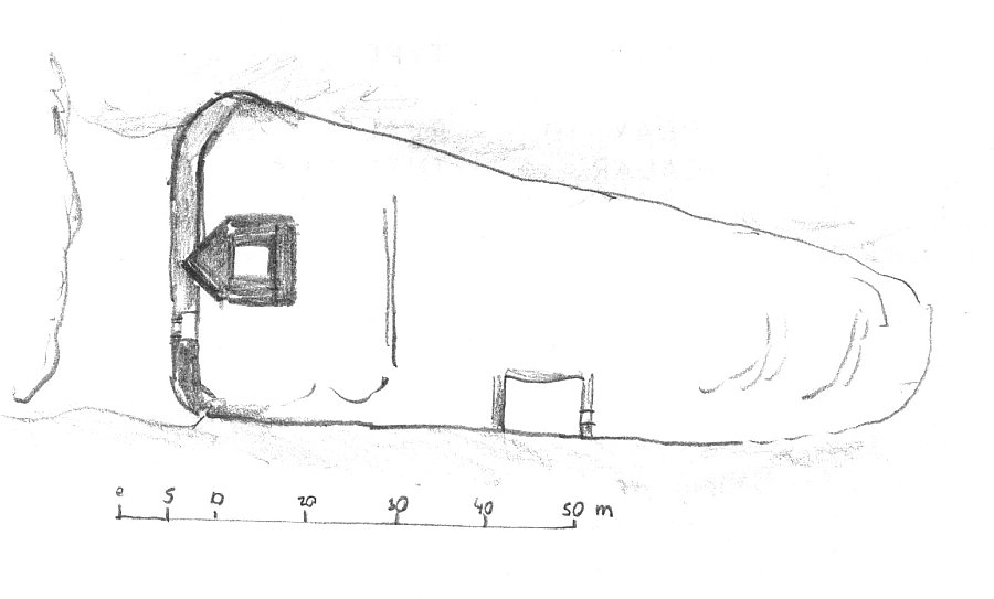 Burg Schlosseck, Grundriss-Skizze, selbst gezeichnet nach "Die Baudenkmle in der Pfalz" (1884-1897)